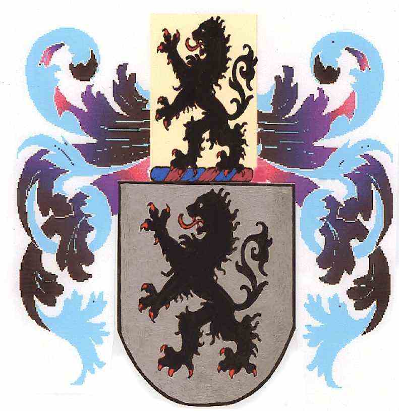 Brasão da família Bettencourt, Portugal